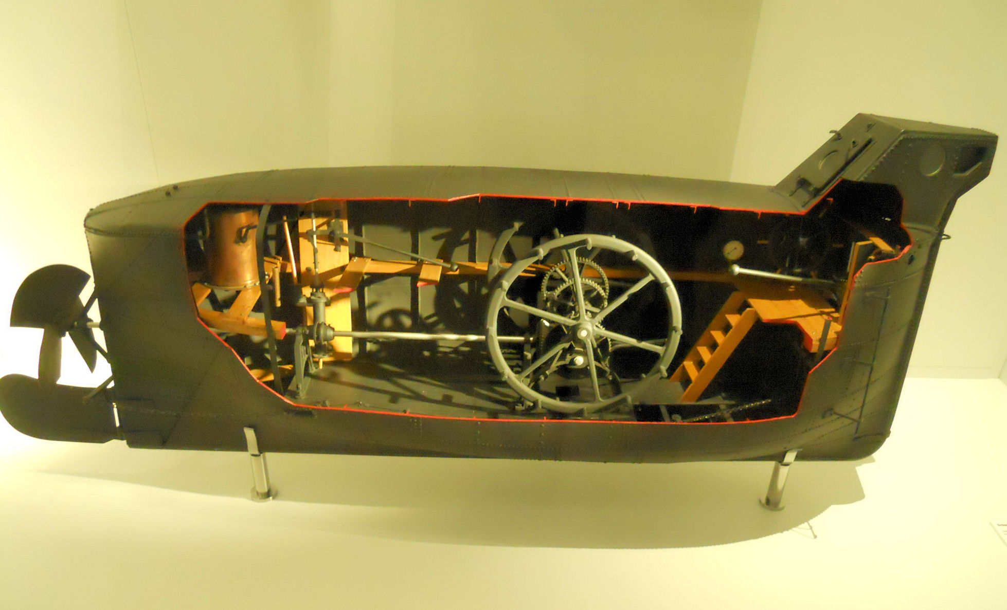 Modell des U-Bootes Brandtaucher